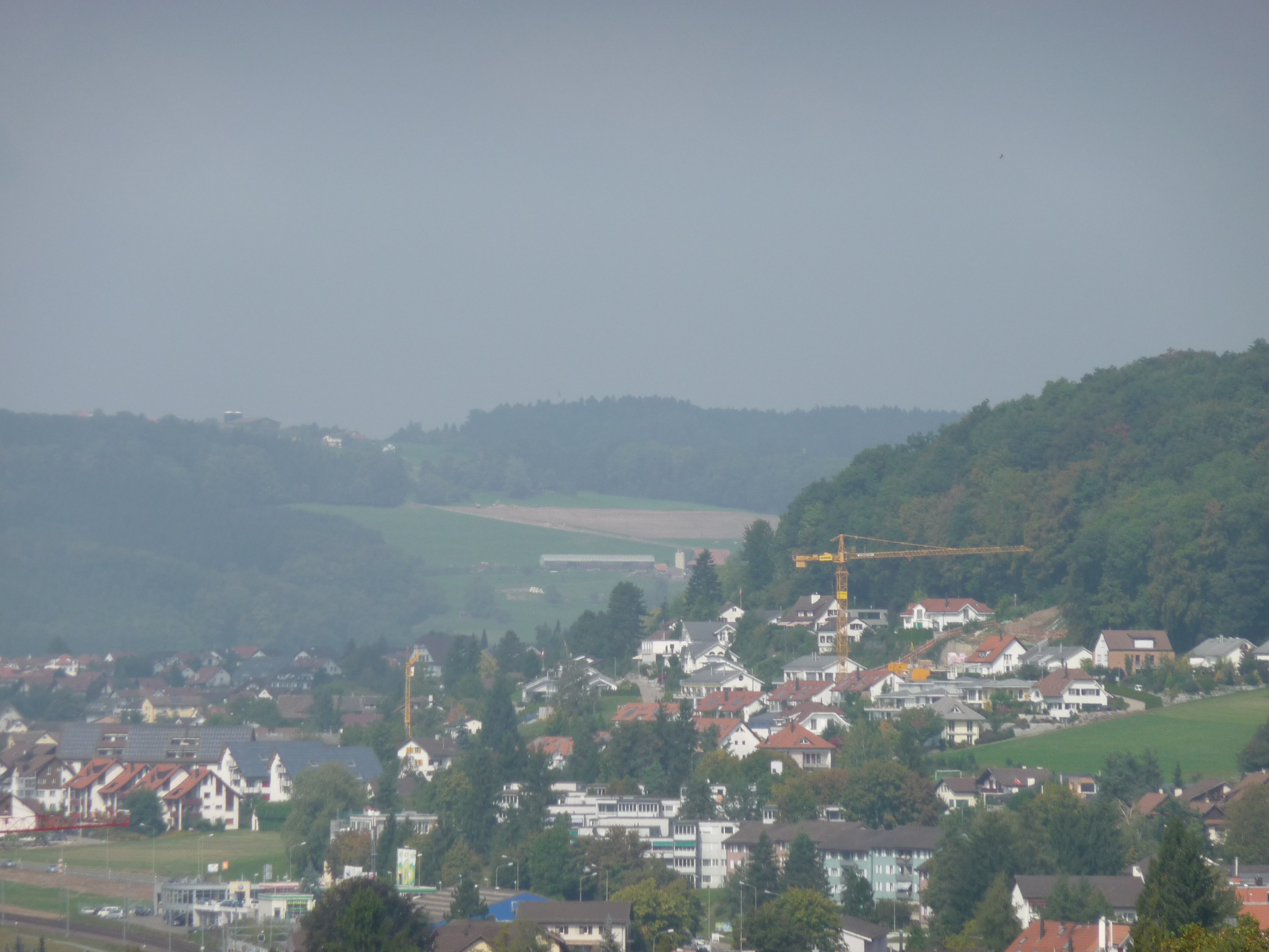 Hedingen.